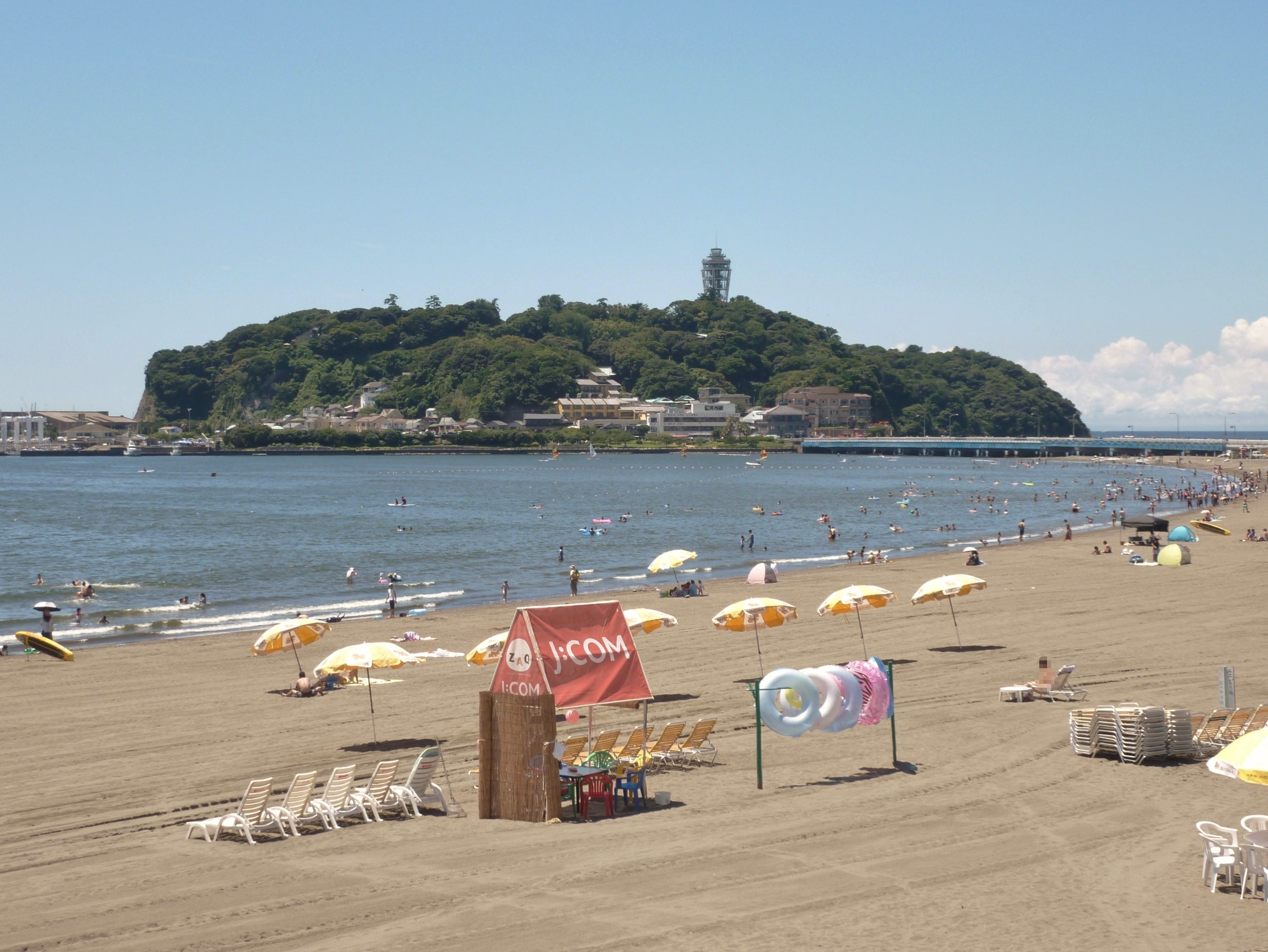 江ノ島東浜海水浴場から見た江の島（神奈川県藤沢市）